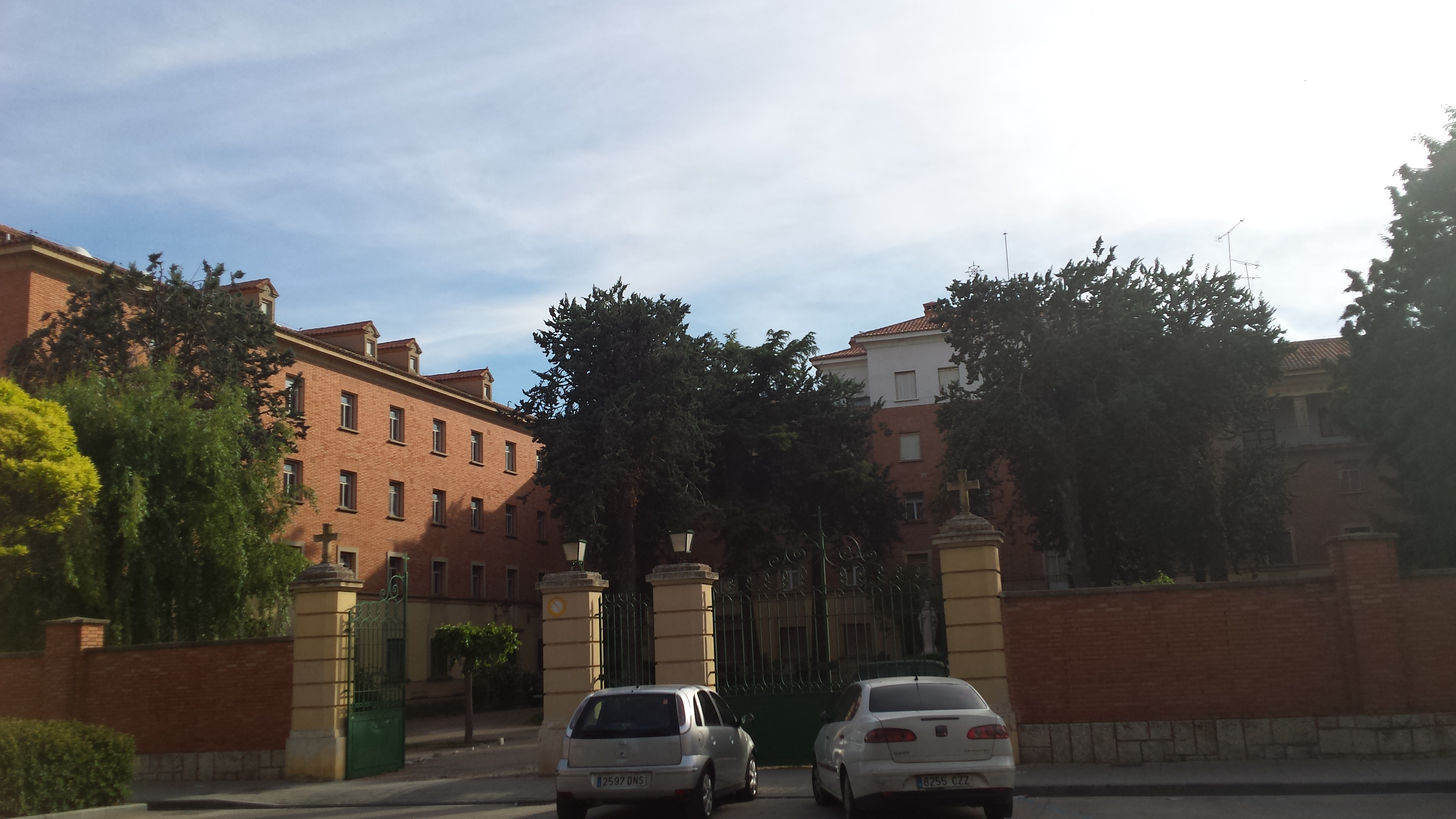 Seminario Diocesano de Albacete. Parroquia de Santa Teresa. Albacete